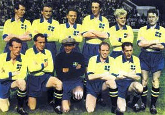 Stående från vänster: Stig Sundqvist, Hasse Jeppsson, Karl Palmér, Knut Nordahl, Lennart "Nacka" Skoglund, Stellan Nilsson. Knästående från vänster: Sune Andersson, Lennart Samuelsson, Kalle Svensson, Erik Nilsson, Ingvar Gärd.